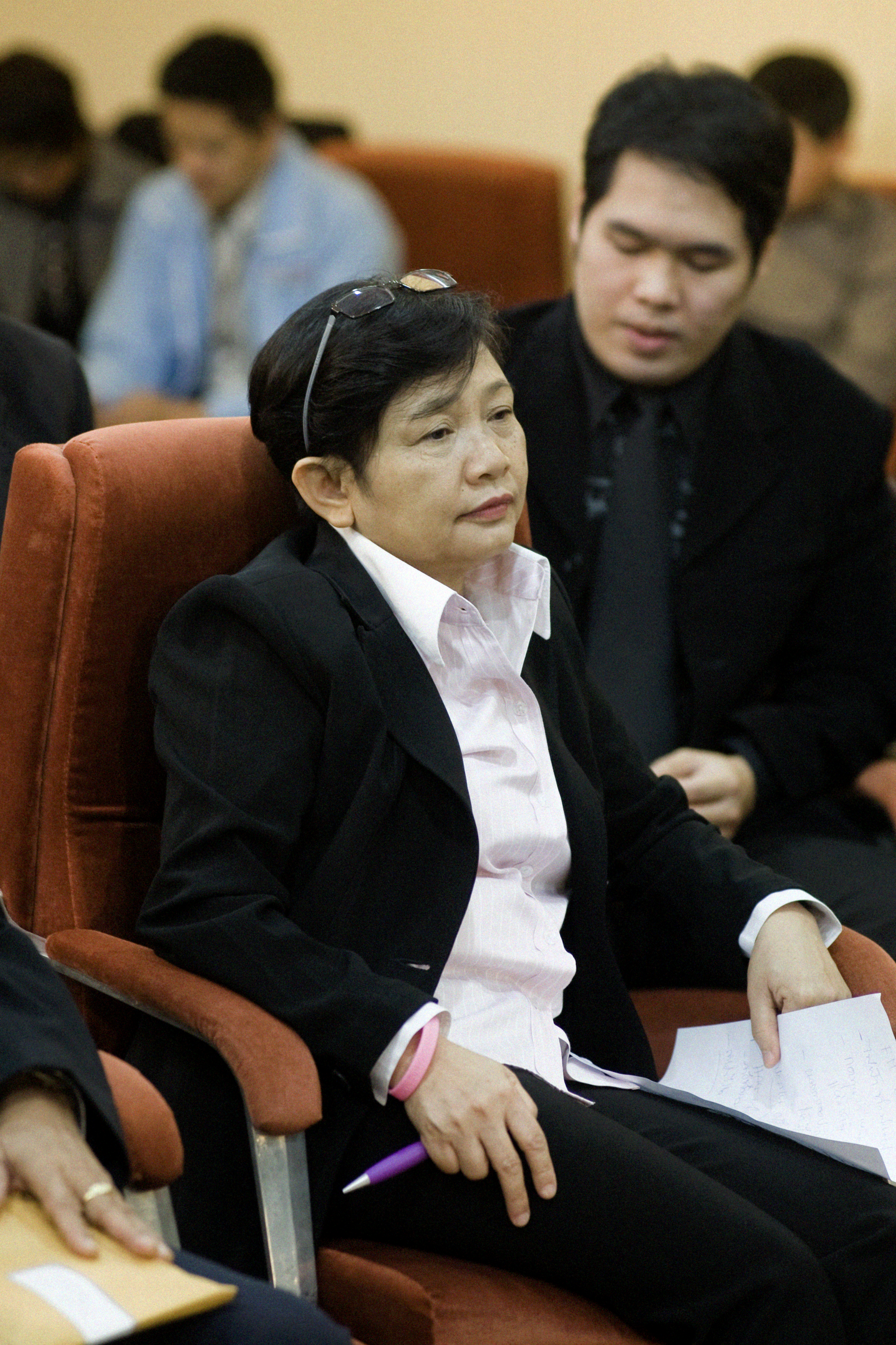 ฟองสนาน จามรจันทร์ / นายกรัฐมนตรี บันทึกรายการเชื่อมั่นประเทศไทยกับนายกฯ อภิสิทธิ์ "คุยข่าวกับ คนข่าววิทยุ" ณ อาคารกรมประชาสัมพันธ์ สถานีวิทยุโทรทัศน์แห่งประเทศไทย 20 กุมภาพันธ์ 2553 (The Official Site of The Prime Minister of Thailand Photo by พีรพัฒน์ วิมลรังครัตน์)